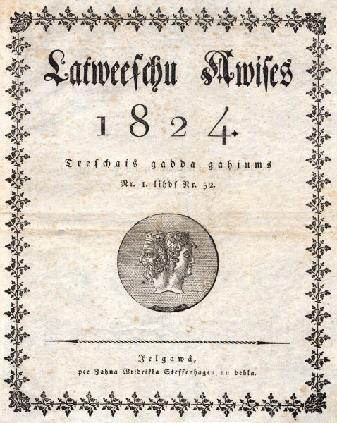 "Latviešu avīzes" (Latweeschu Awises) - pirmā avīze latviešu valodā, kas sāk iznākt Jelgavā 1822. gadā (līdz 1915. gadam).